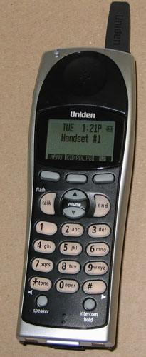 Uniden 2.4 GHz cordless phone model DCT 5285 handset.